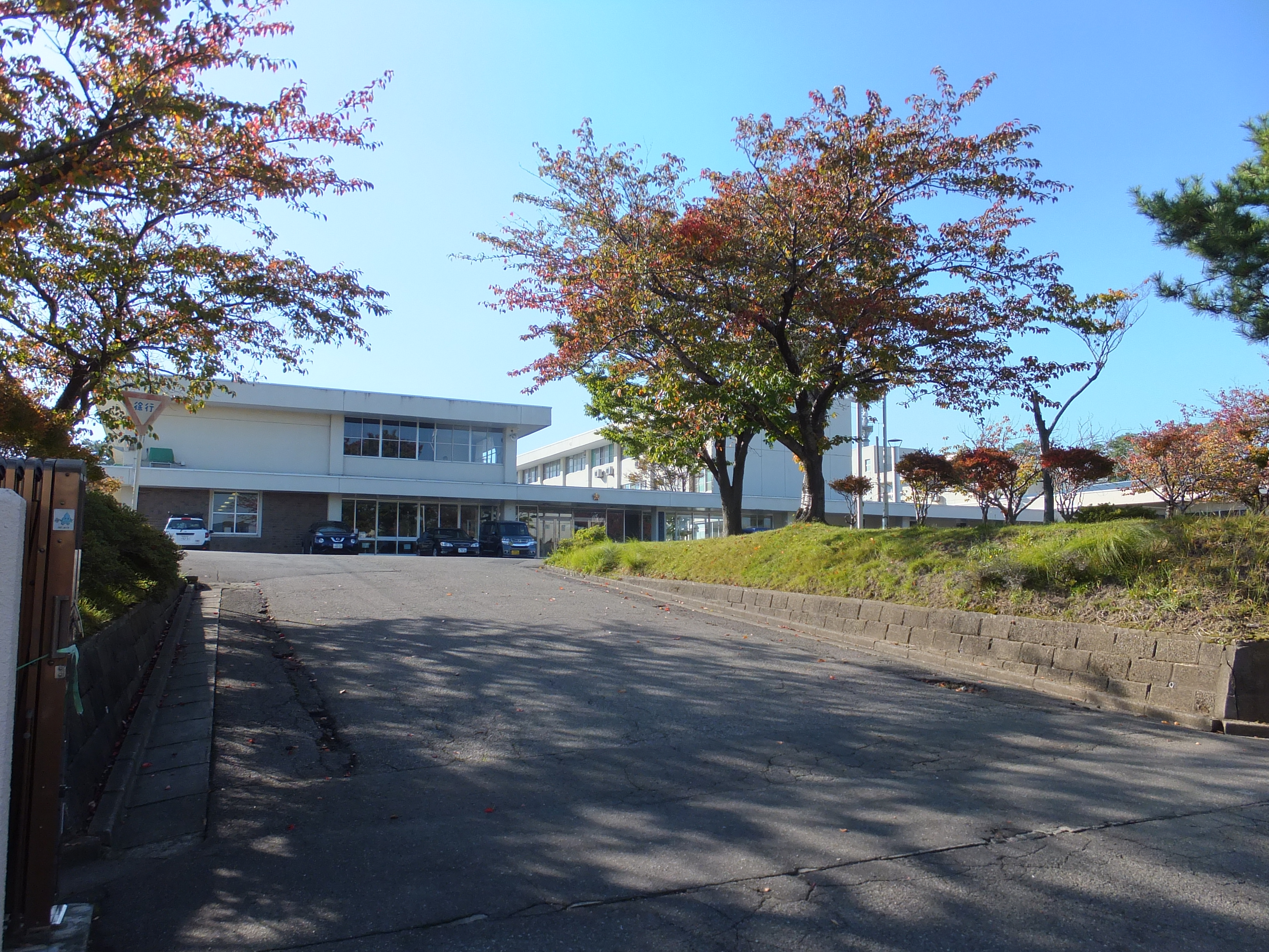 秋田県警察学校（秋田市新屋勝平台）